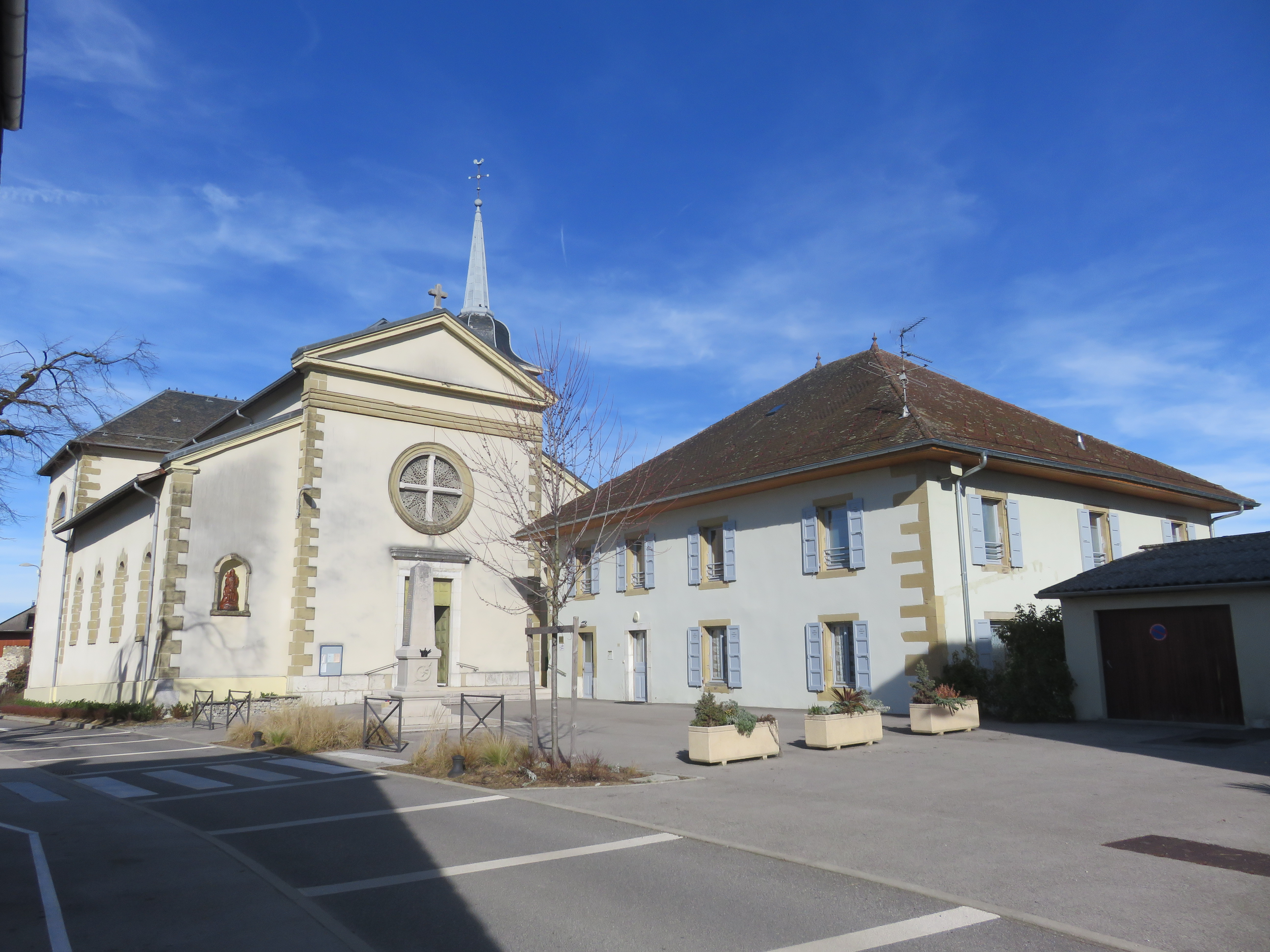 L’église Saint-Maurice et le presbytère (Marcellaz-Albanais, France) le 23 février 2020.